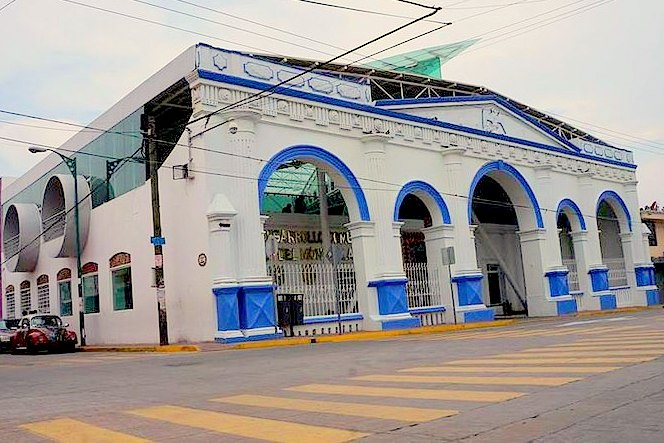 Casa de la cultura de San Pablo del Monte